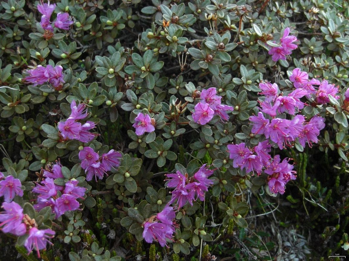 Rhododendron lapponicum (L.) Wahlenb. 20090624.176 Mount Stearns, Willmore Wilderness, Alberta